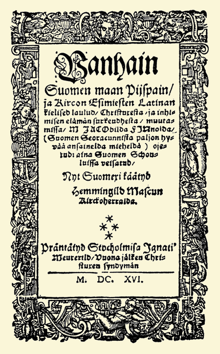 Piae Cantiones 1616